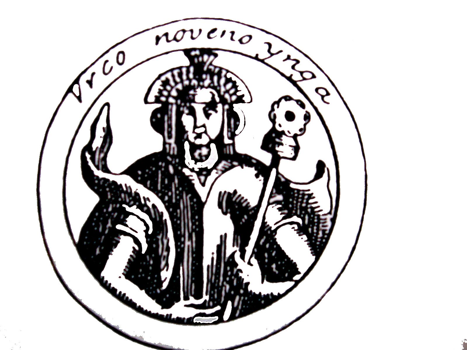 Unico retrato de Inca Urco